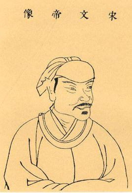 宋文帝像